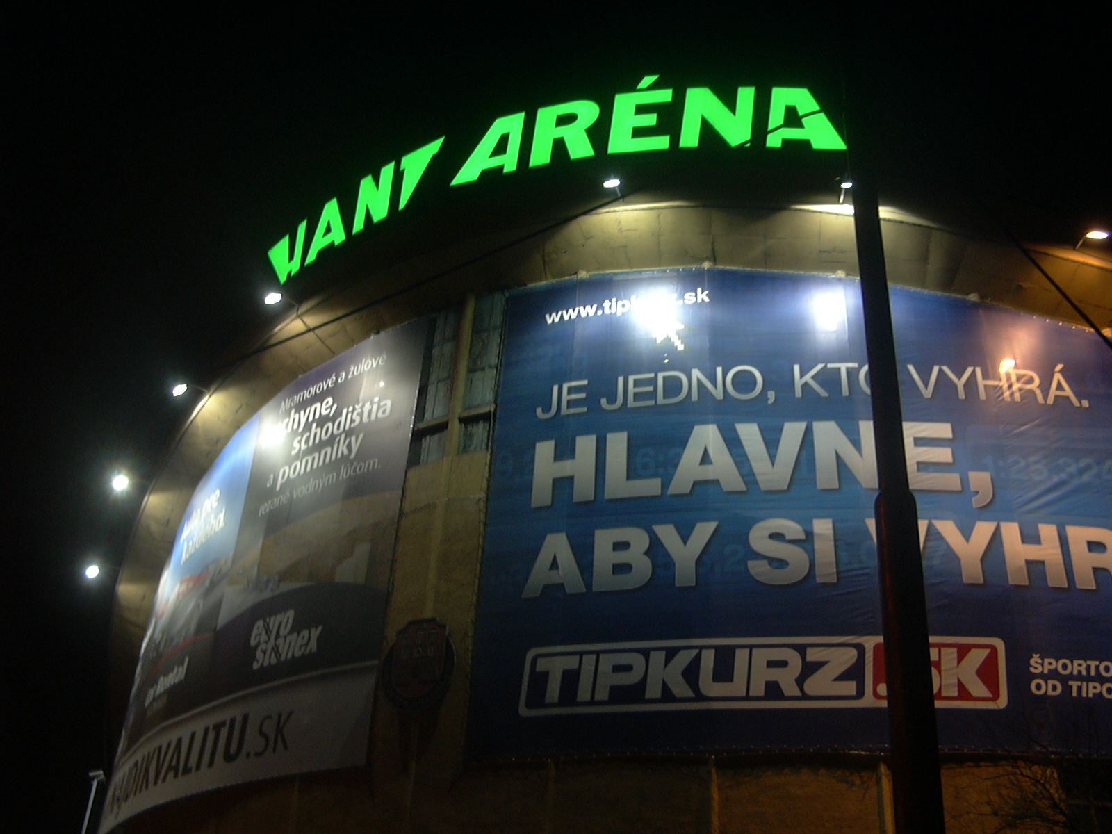 Inter hala Pasienky v noci